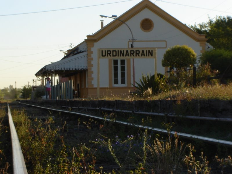 Estación de tren de Urdinarrain, Entre Ríos.